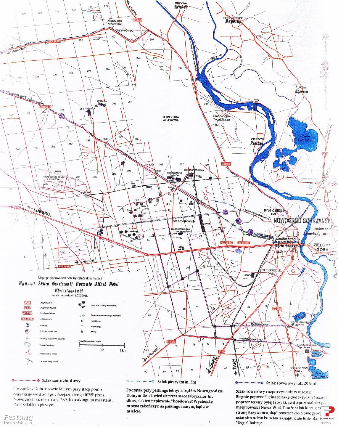 Mapa terenu dawnego kombinatu zbrojeniowego DAG Alfred Nobel w Krzystkowicach k. Nowogrodu Bobrzańskiego. Mapa ta jest o tyle ciekawa, że wręcza ją Straż Leśna przy wlepianiu mandatu za wjazd do lasu:). Ocenę skali zjawiska pozostawiam oglądającym.